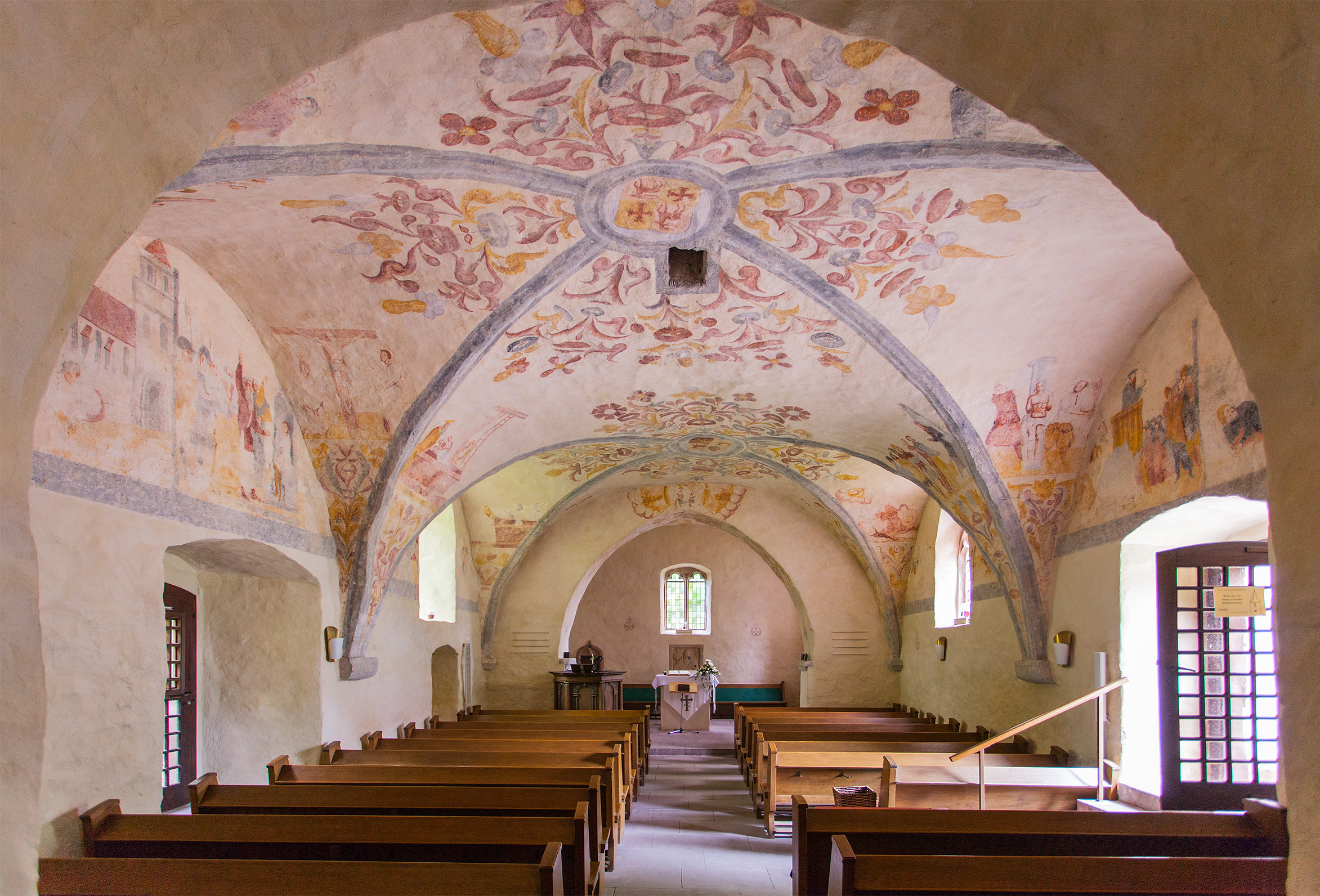 Innenraum der Evangelischen Kirche Sonneborn (Barntrup), Kreis Lippe This is a photograph of an architectural monument.